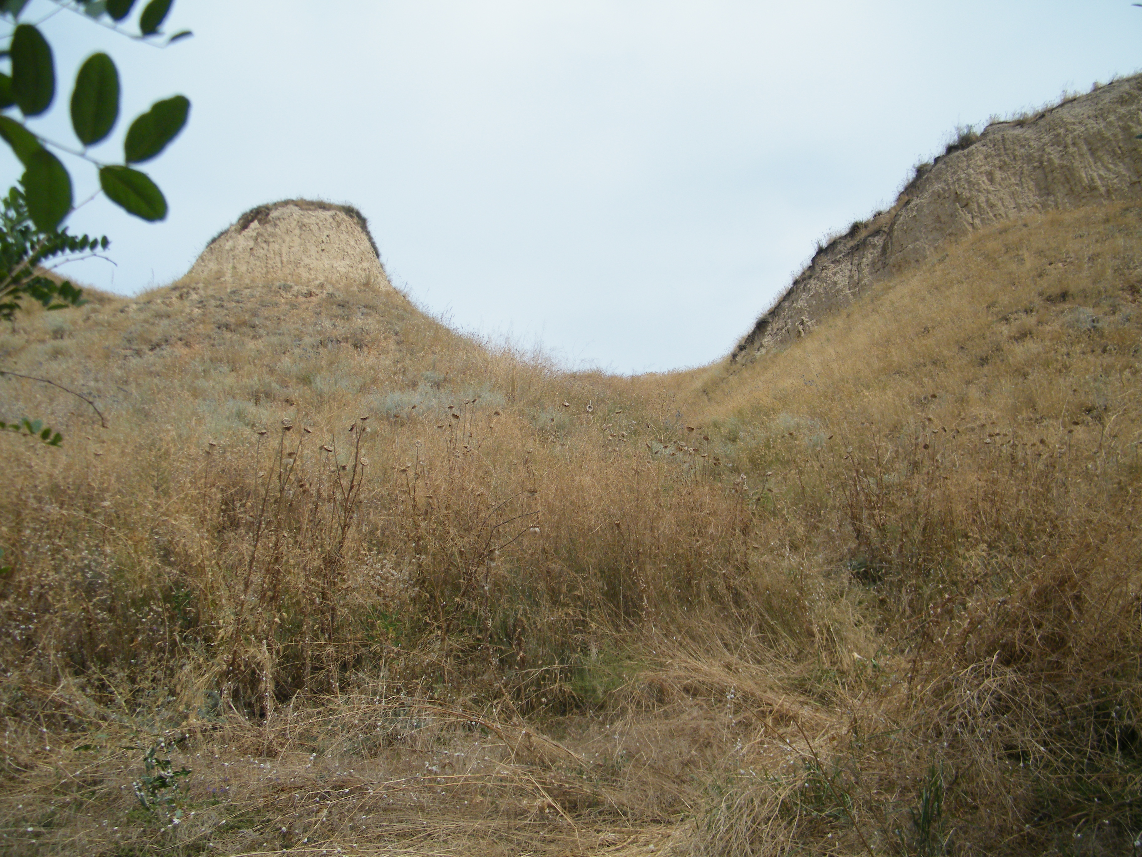 Очаківські схили біля моря